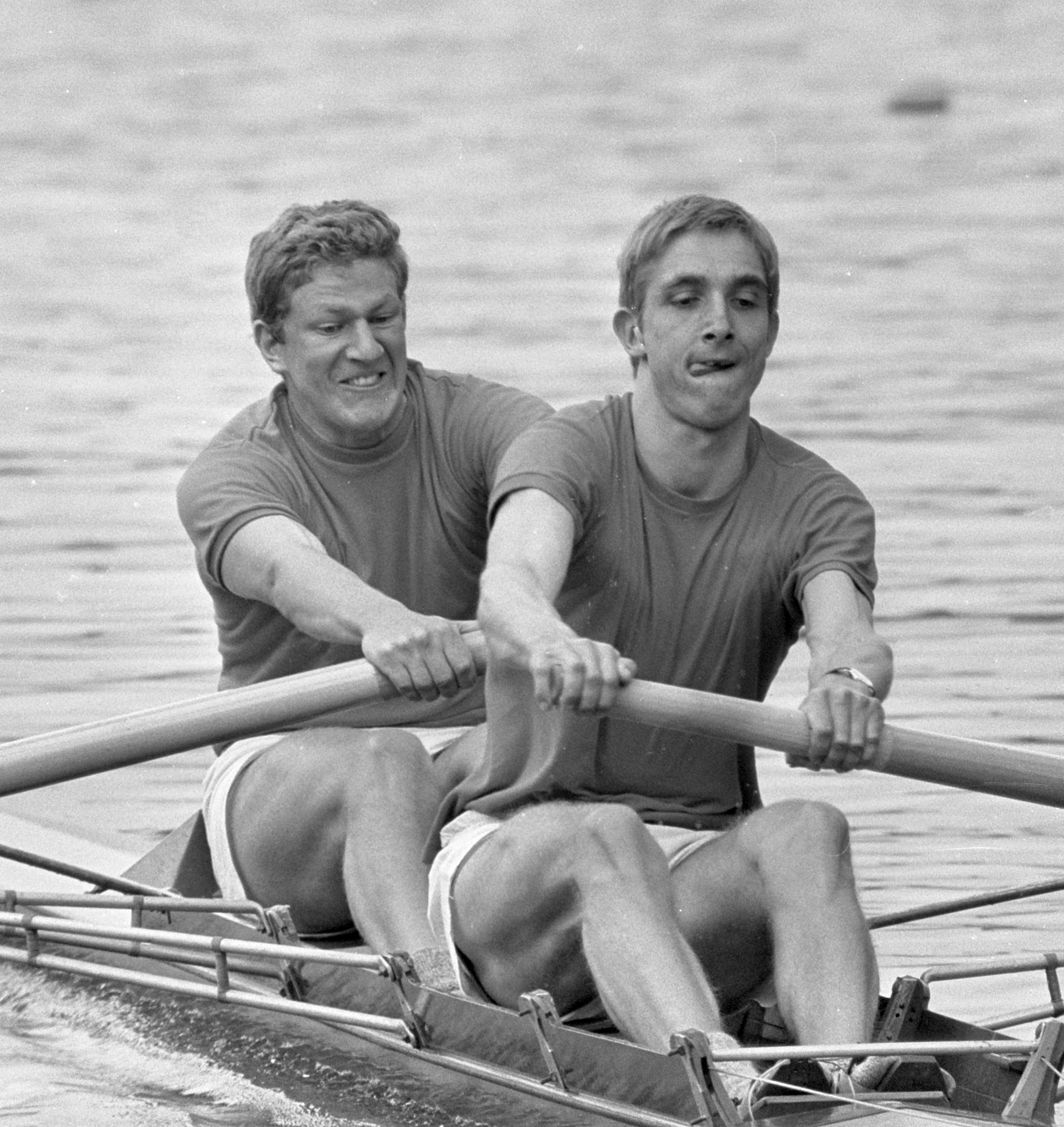 Roeien Nederland tegen Duitsland Bosbaan.. Ruud Stokvis (left) and Roel Luynenburg